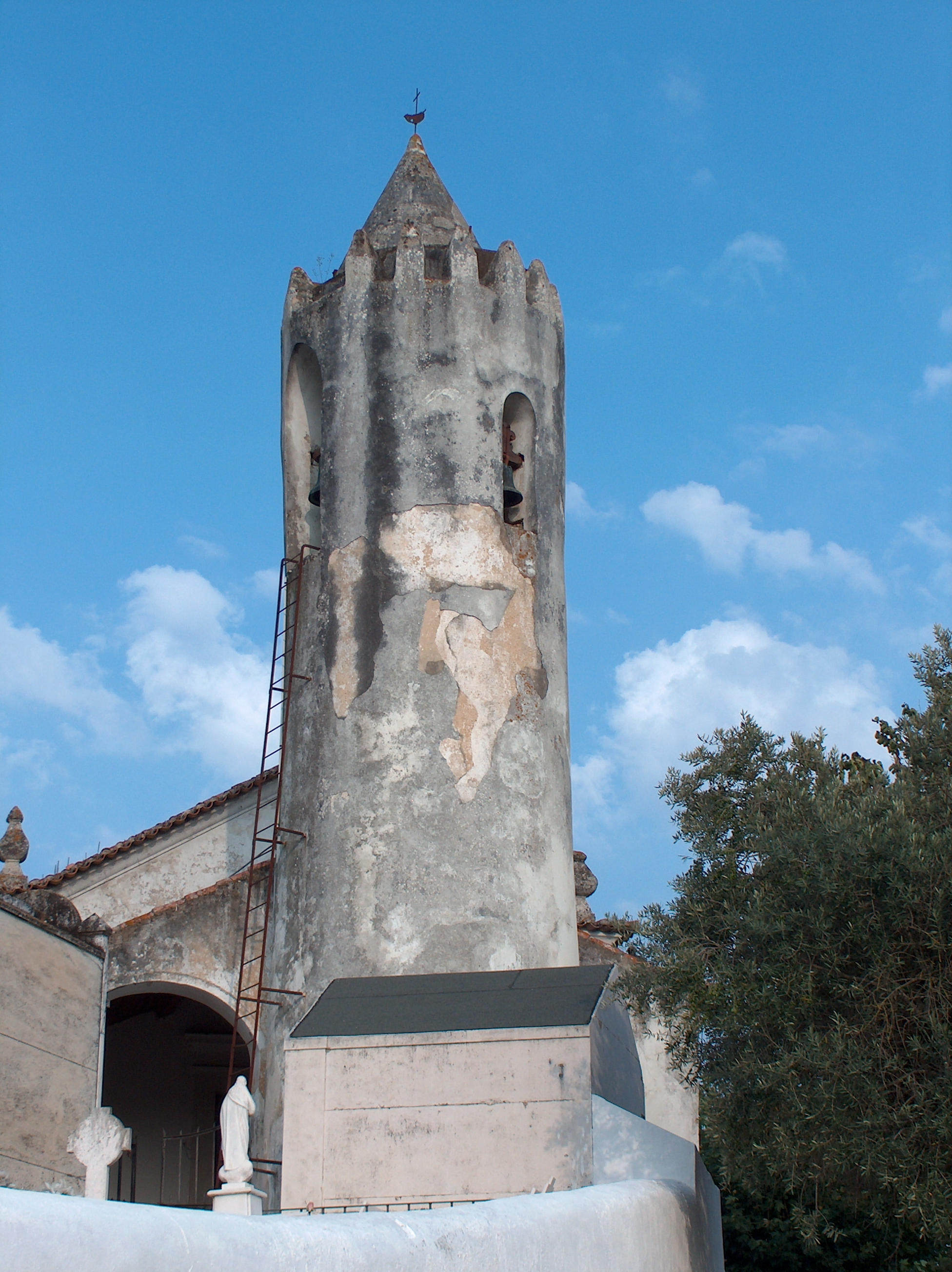 Igreja de São João da Ribeira e Torre Mourisca This file was uploaded for Wiki Loves Monuments in Portugal with the unique identifier 97012882.